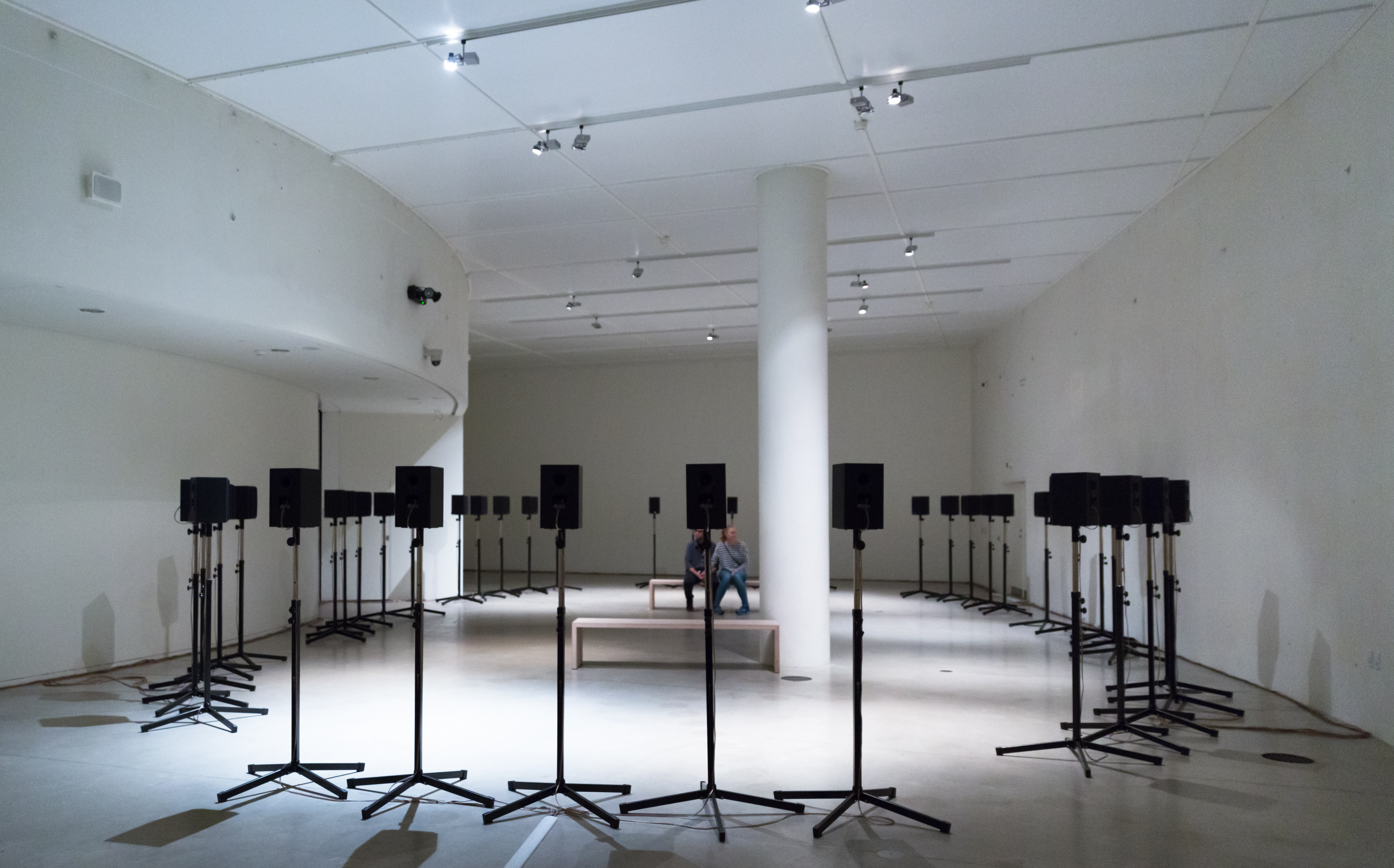 Lydinstallation ARoS i forbindelse med udstillingen JANET CARDIFF OG GEORGE BURES MILLER - SOMETHING STRANGE THIS WAY, hvor Janet Cardiffs lydværk The Forty Part Motet (2001), en nyfortolkning af en korsats fra 1573 med titlen "SPEM in Alium" af Thomas Tallis